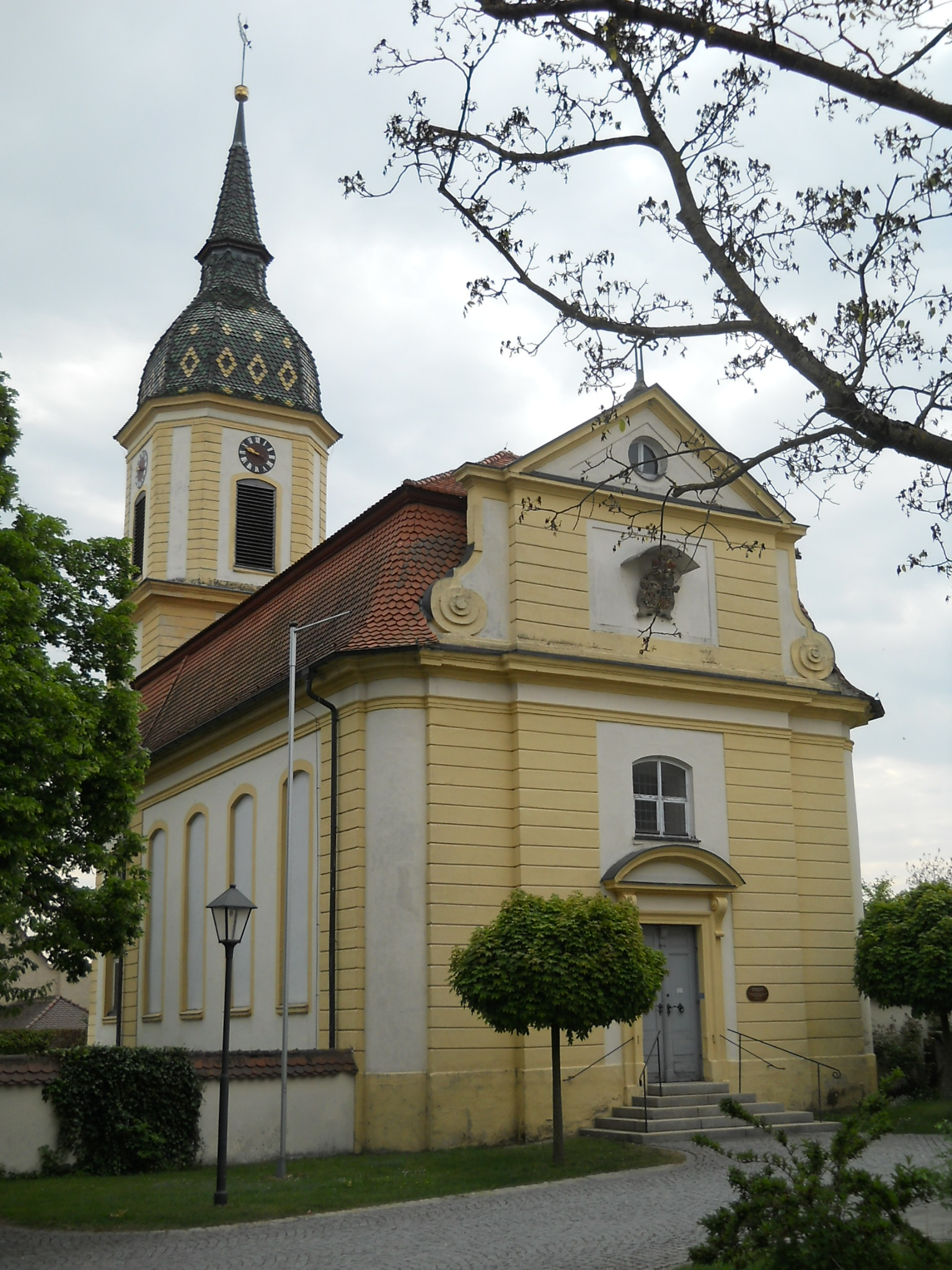 Aha, Ortsteil von Gunzenhausen, Evang.-Luth. Pfarrkirche